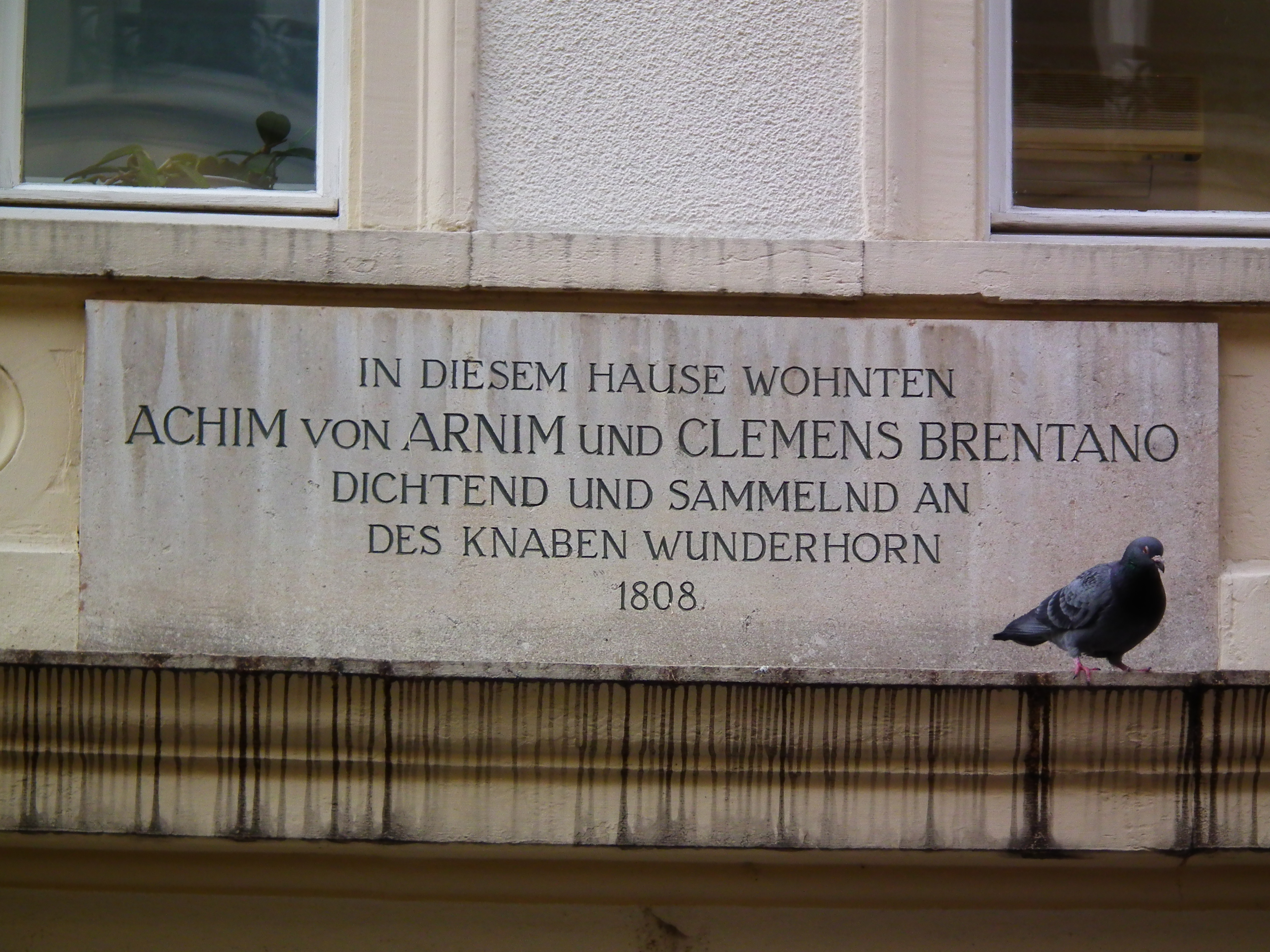 Wohnhaus in der Heidelberger Altstadt, in dem 1808 Achim von Arnim und Clemens Brentano gewohnt haben (Baden-Württemberg, Deutschland)